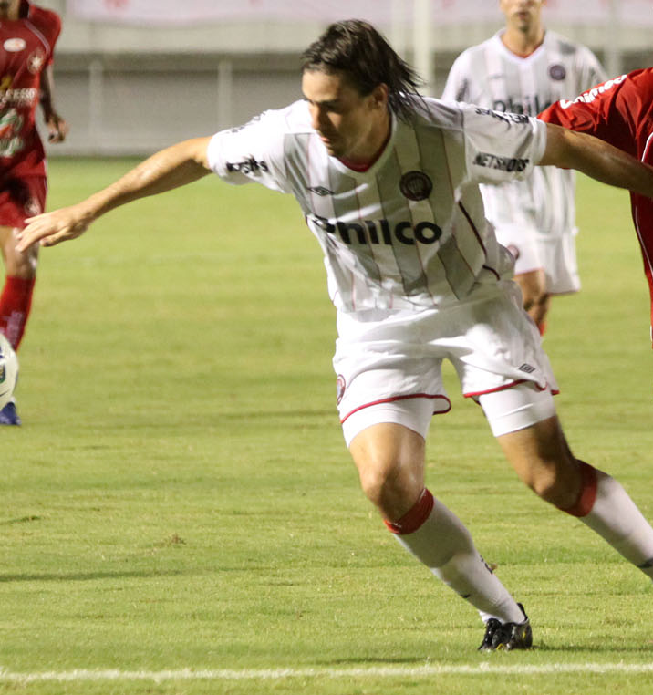 Rio Branco surpreende, joga bem e vence o Atlético Paranaense na Arena da Floresta Rio Branco surpreende, joga bem e vence o Atlético Paranaense na Arena da Floresta